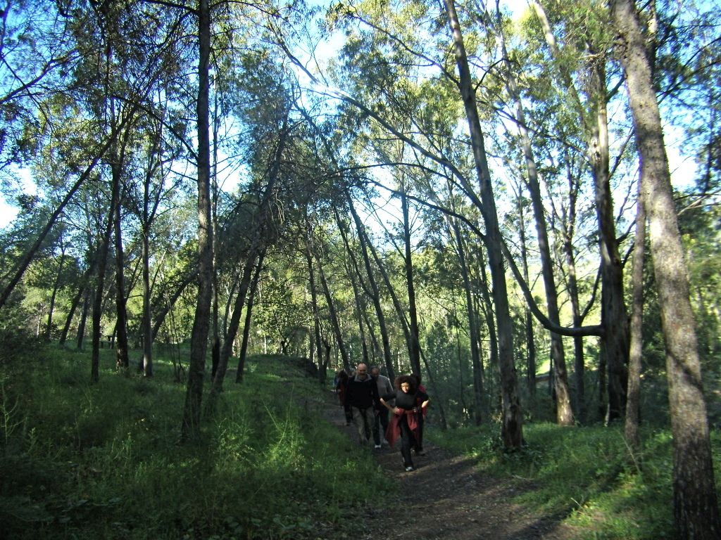 Hacho de Pizarra